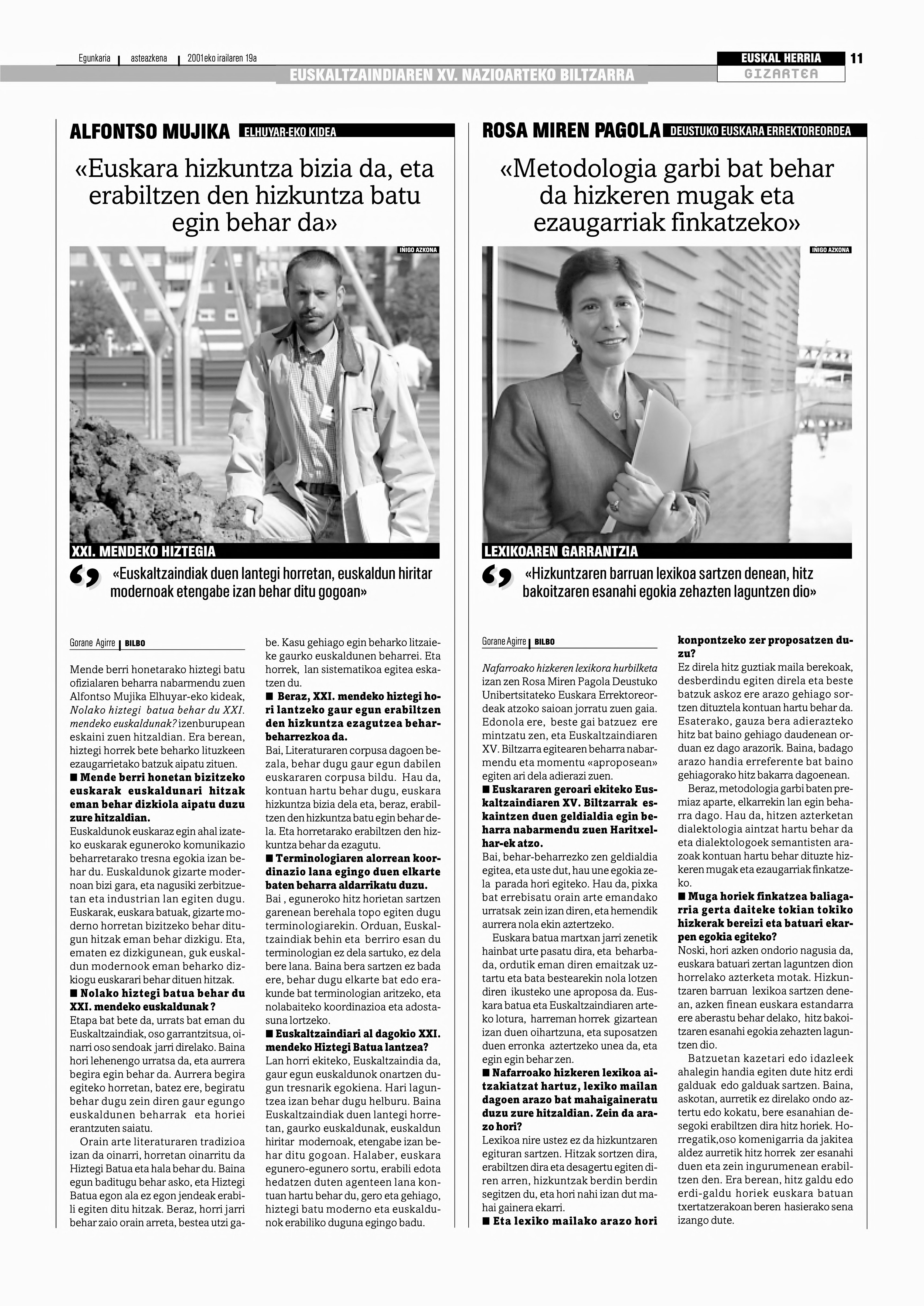 Alfontso Mujika, Euskaldunon Egunkarian hiztegintzaz.